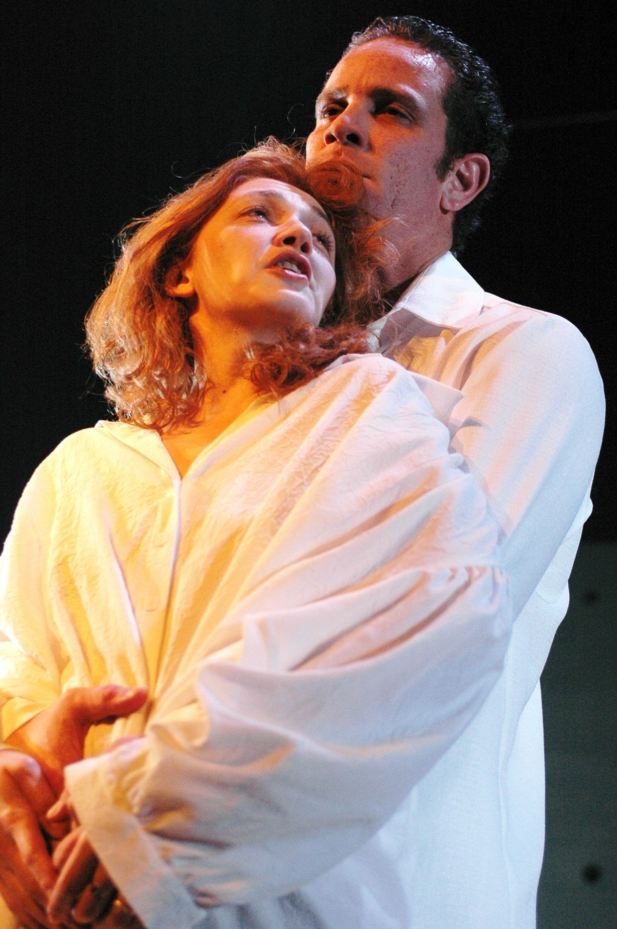 מיקי לאון ויבגניה דודינה בהצגה מדיאה, תיאטרון גשר